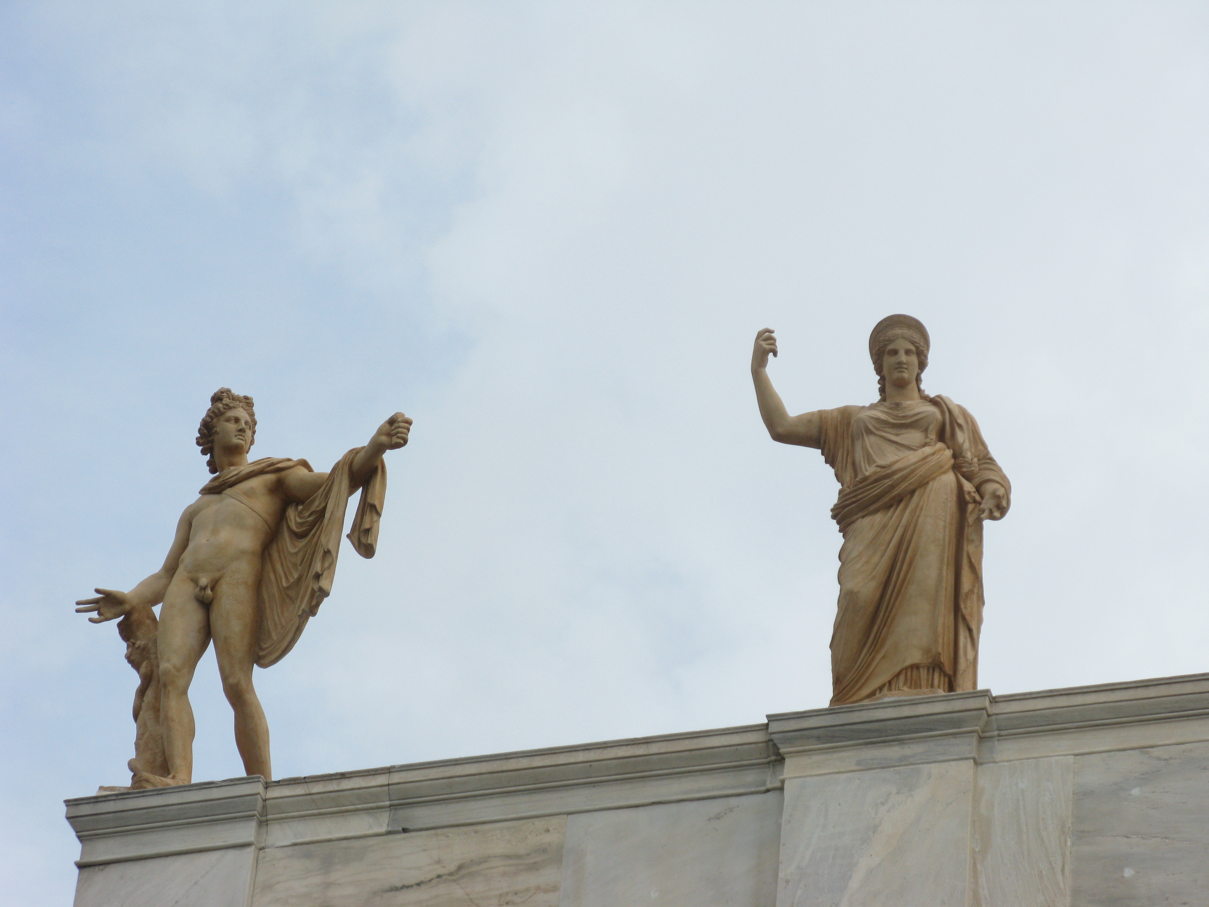 Εθνικό Αρχαιολογικό Μουσείο. Αθήνα.